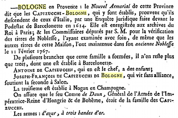 Maintien des Capizucchi-Bologne dans leur ancienne Noblesse le 11 février 1767.